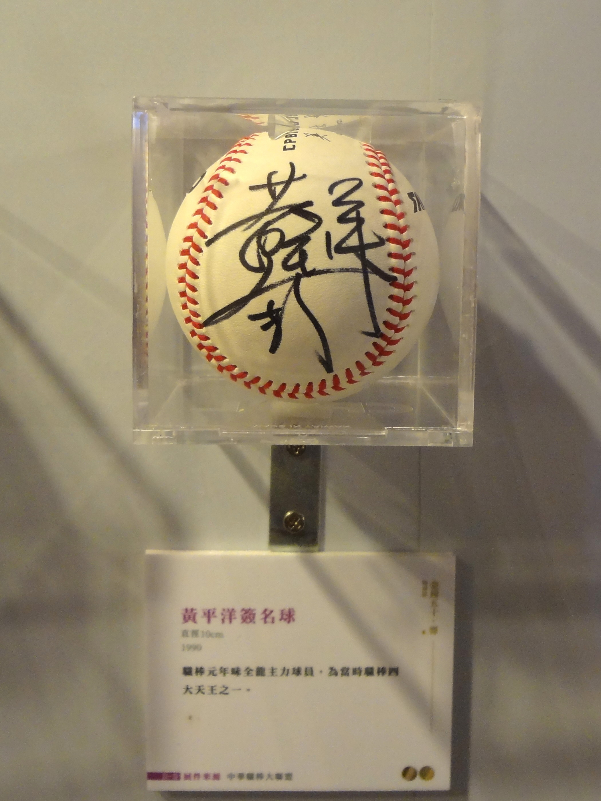 松山文化創意園區「金鐘五十．響 特別展」展示品：1990年中華職棒元年味全龍主力球員黃平洋簽名球。